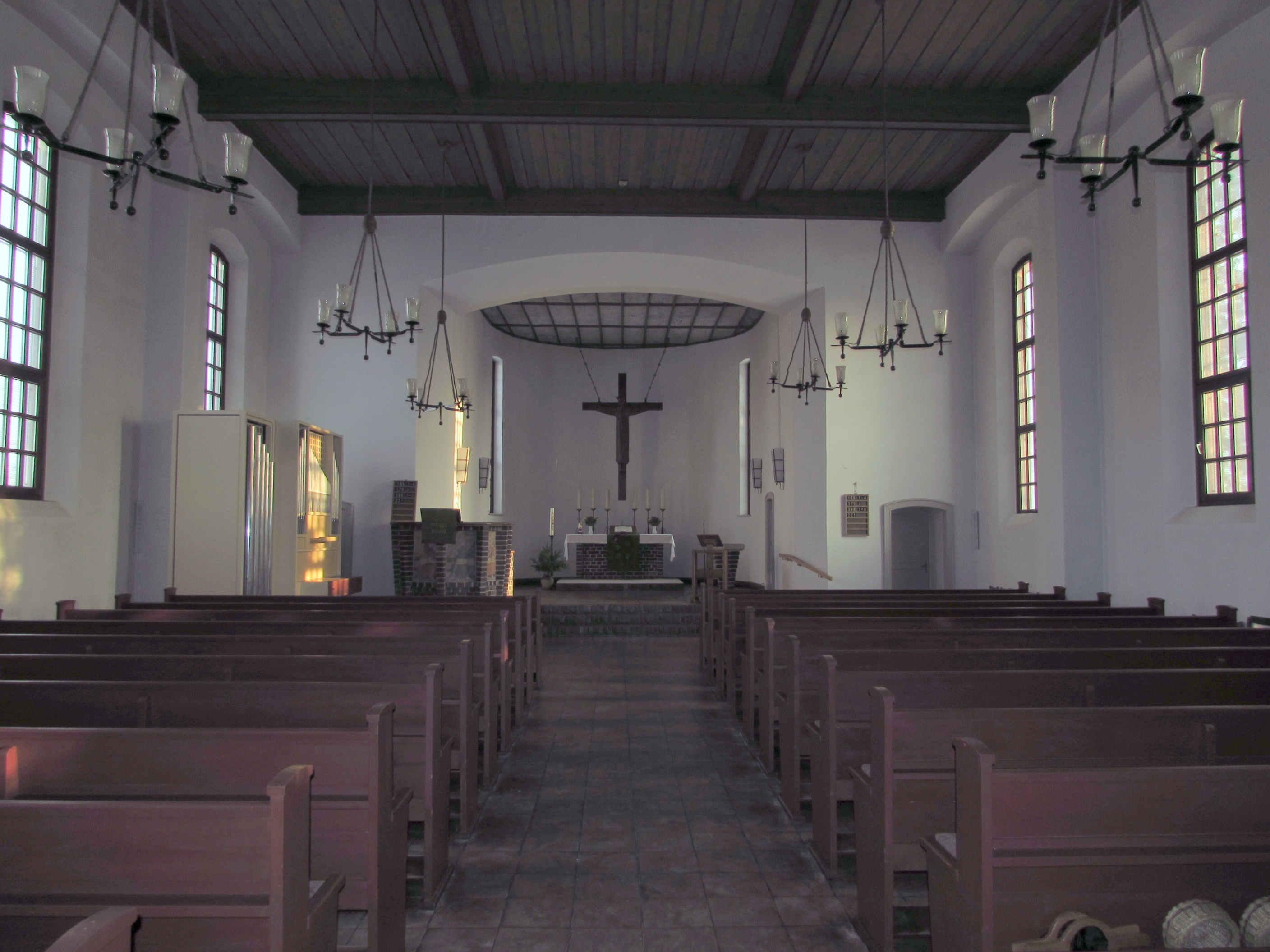 auferstehungskirche brandenburg innenraum nach osten